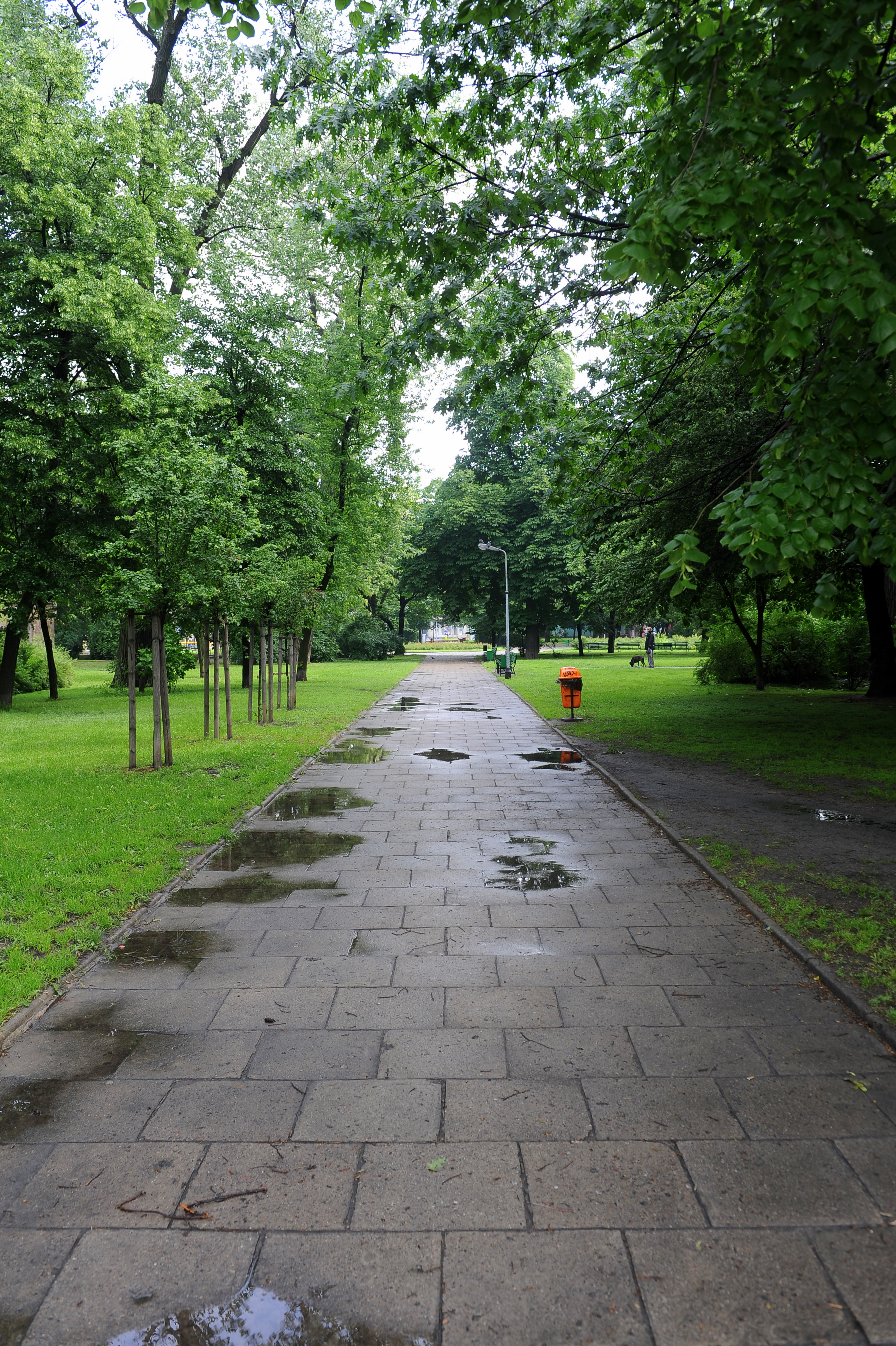 Park im. Stanisława Moniuszki w Łodzi